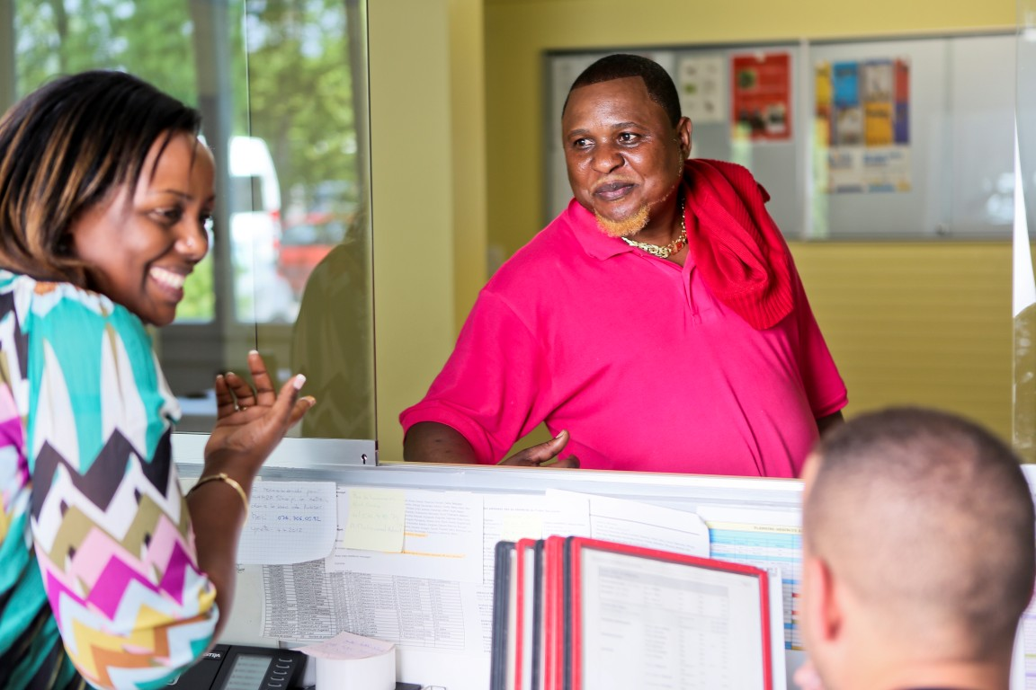 La réception dans un foyer de requérants d’asile de l’Hospice général